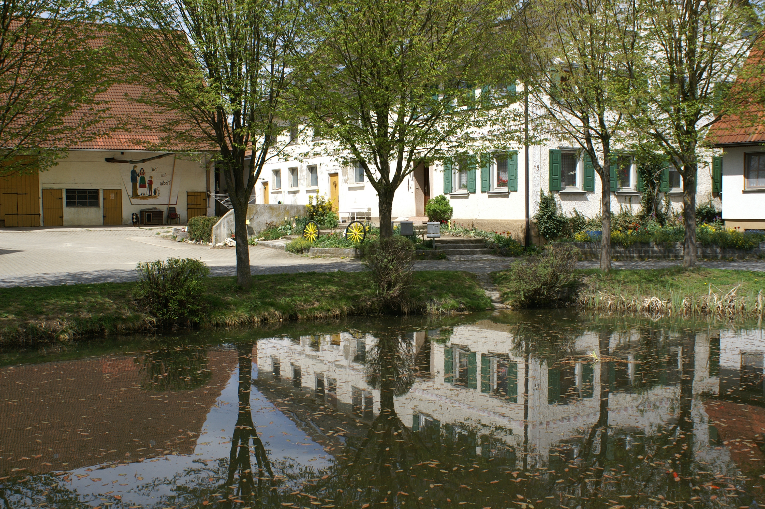 Hüle in Bühlenhausen im Alb-Donau-Kreis, Baden-Württemberg